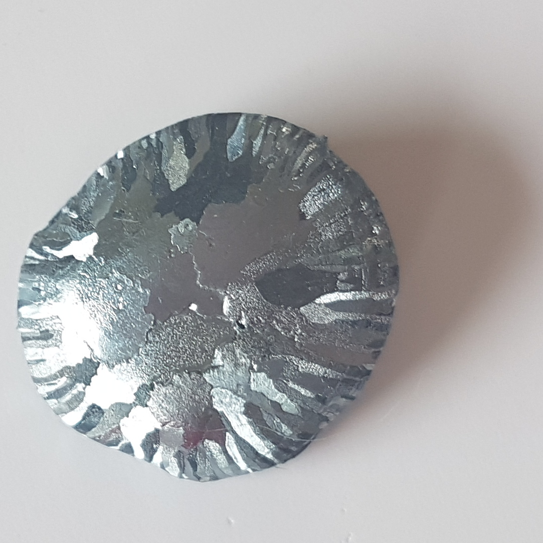 Слиток осмия с видимой структурой металла